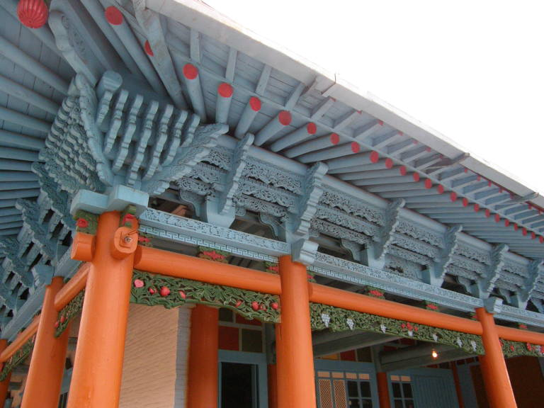 Dungan mosque, Karakol